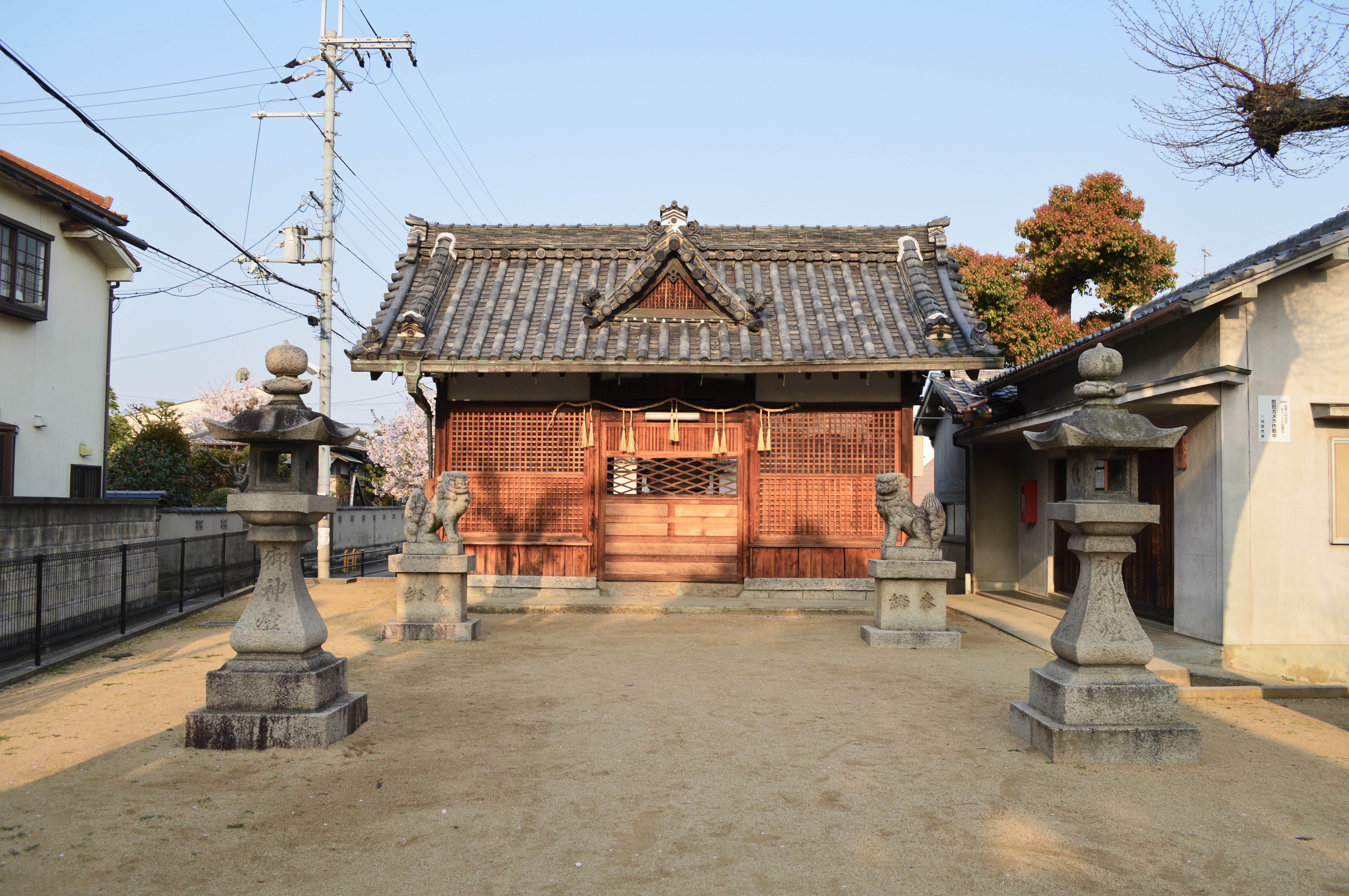 樟本神社 (八尾市北木の本) 拝殿